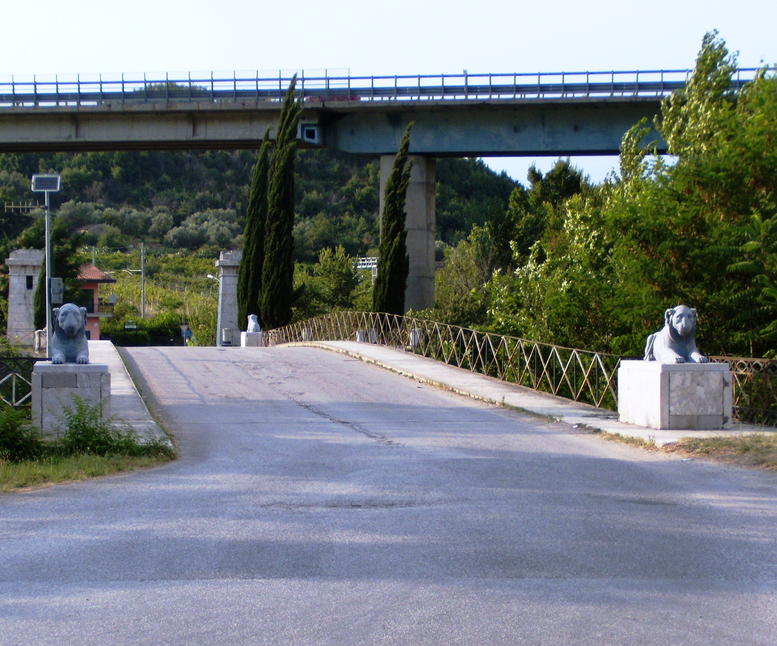 Immagine recente del Ponte Maria Cristina a Solopaca (Bn-Italia).